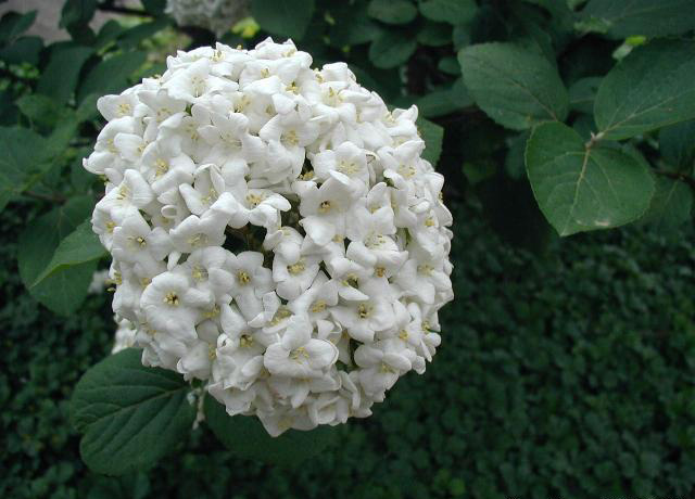 Viburnum carlcephalum